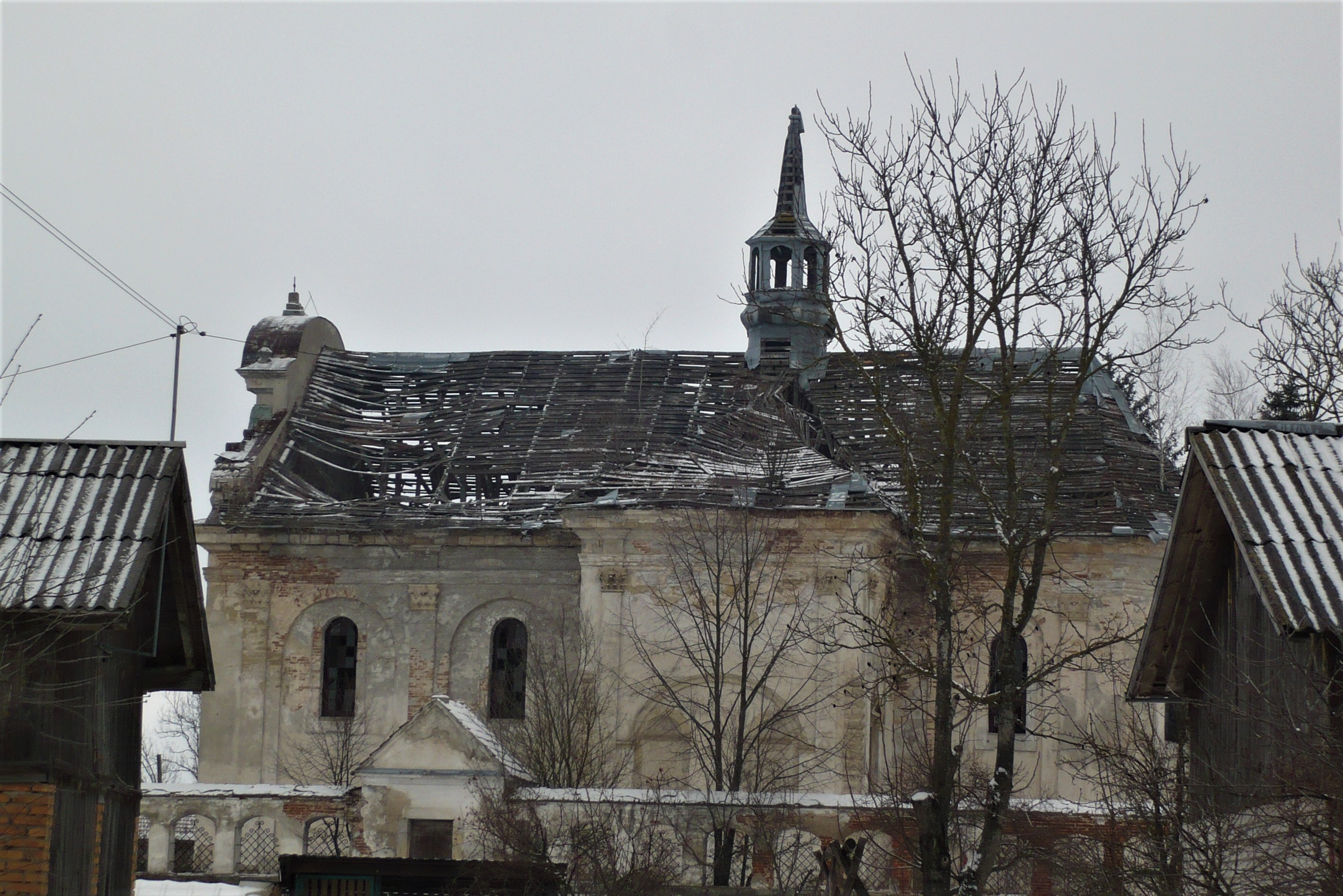 Biały Kamień. Kościół